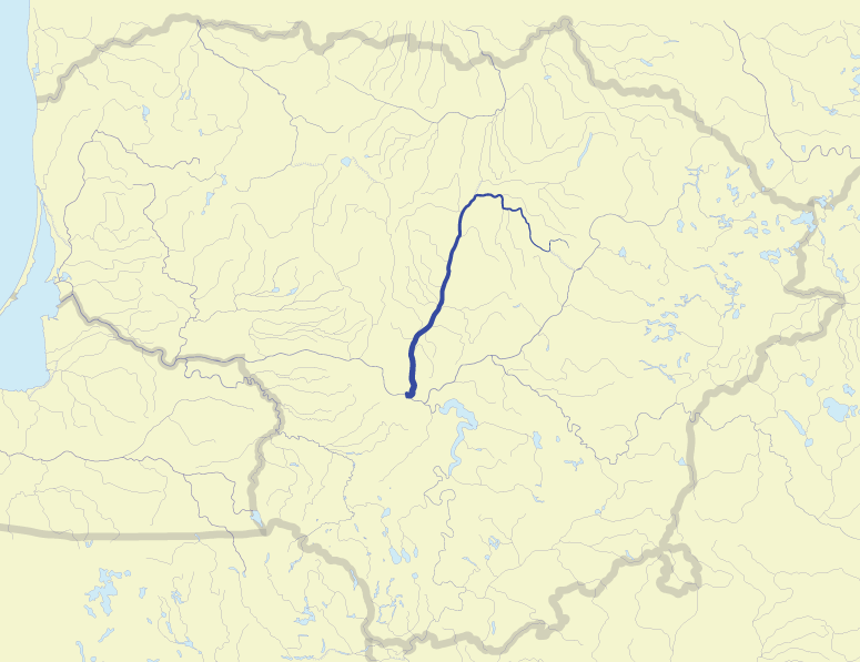 River Nevėžis